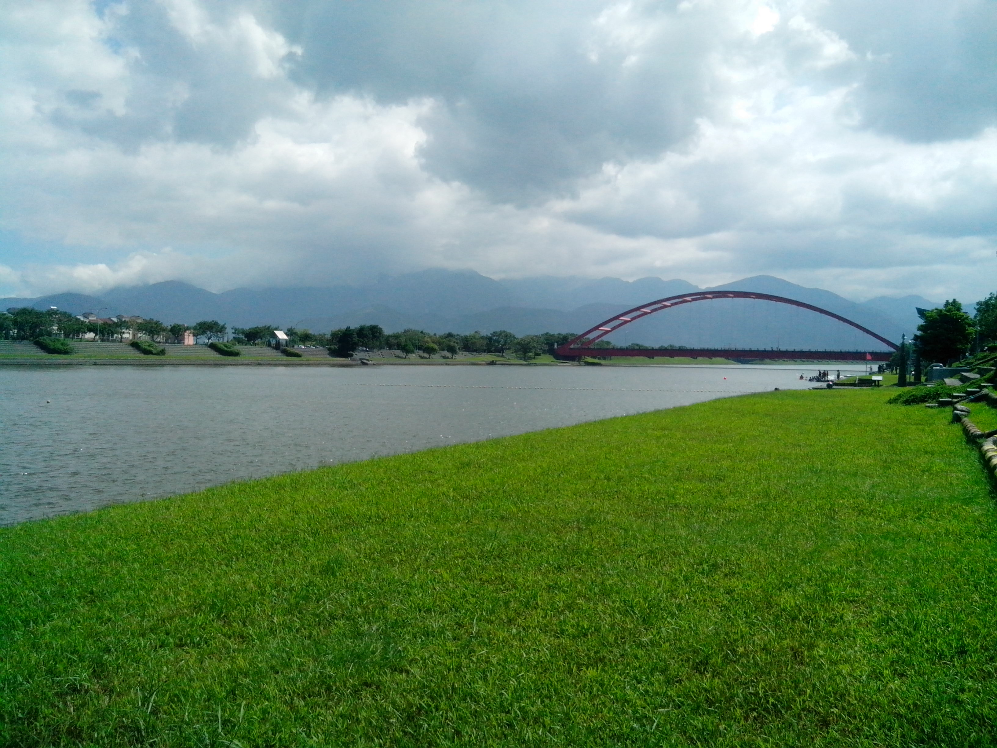 台灣宜蘭縣冬山河